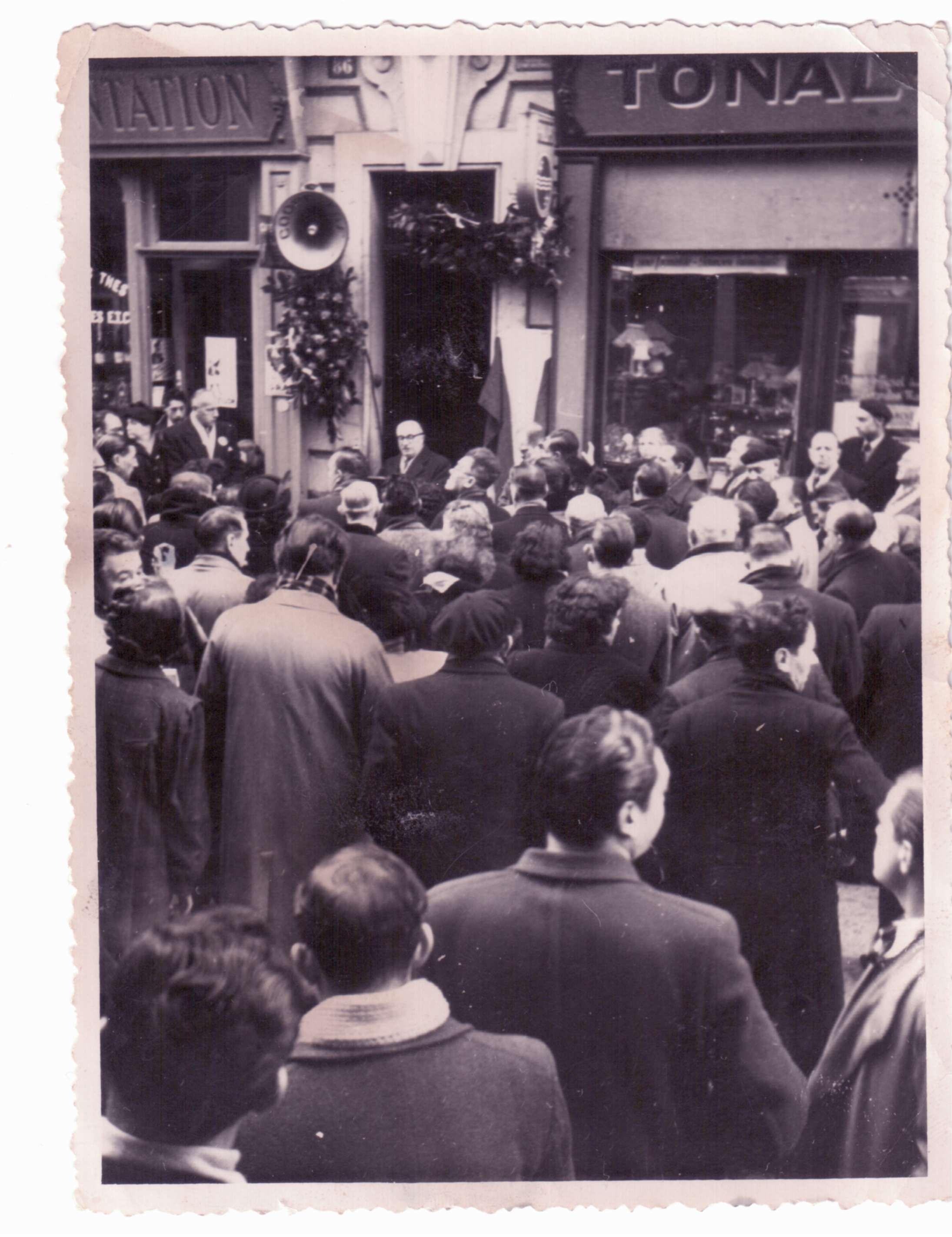 Inauguration, dans les années 50, de la plaque commémorative en hommage à Raymond Luauté (1905-1945), militant communiste déporté, au numéro 86 rue de Bagnolet, XXe arrondissement, Paris, France.